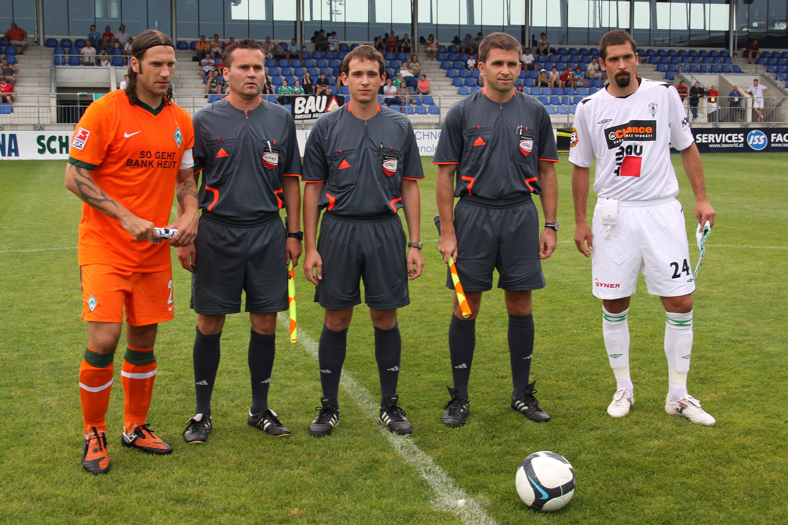 Werder Bremen gegen FK Jablonec — Kapitän Torsten Frings, Schiedsrichterassistent Paul Pethö, Schiedsrichter Benjamin Steuer, Schiedsrichterassistent Roland Braunschmidt und Kapitän Petr Pavlik